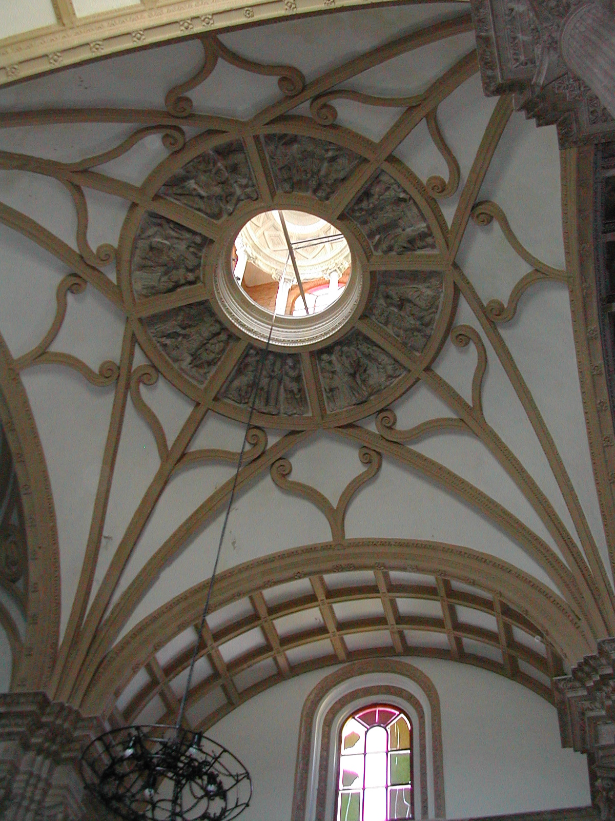 Bóveda del crucero de la iglesia del Antiguo Convento de Santo Domingo de La Guardia de Jaén.